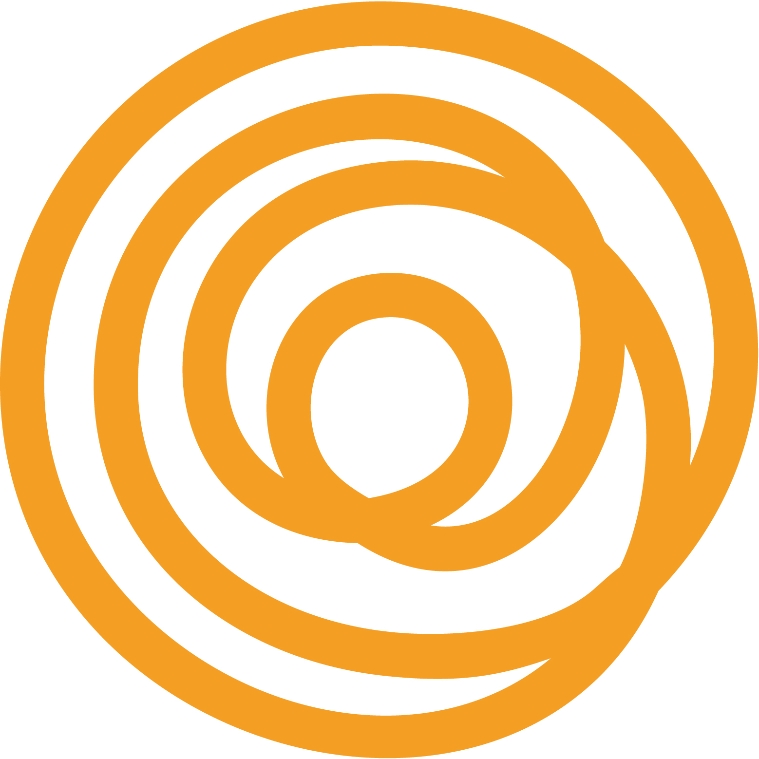 Gestaltet von Walter Obholzer